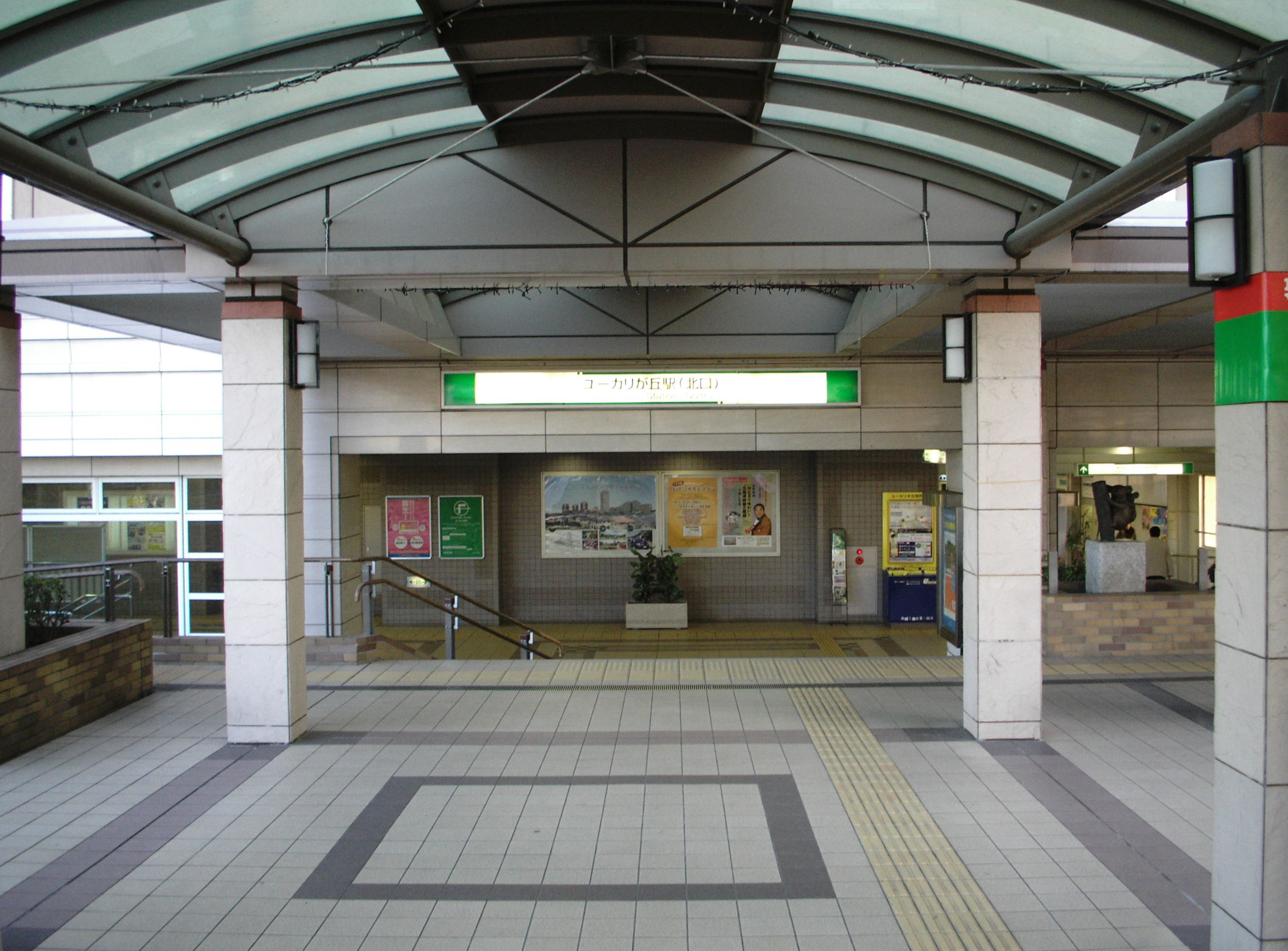 ユーカリが丘駅